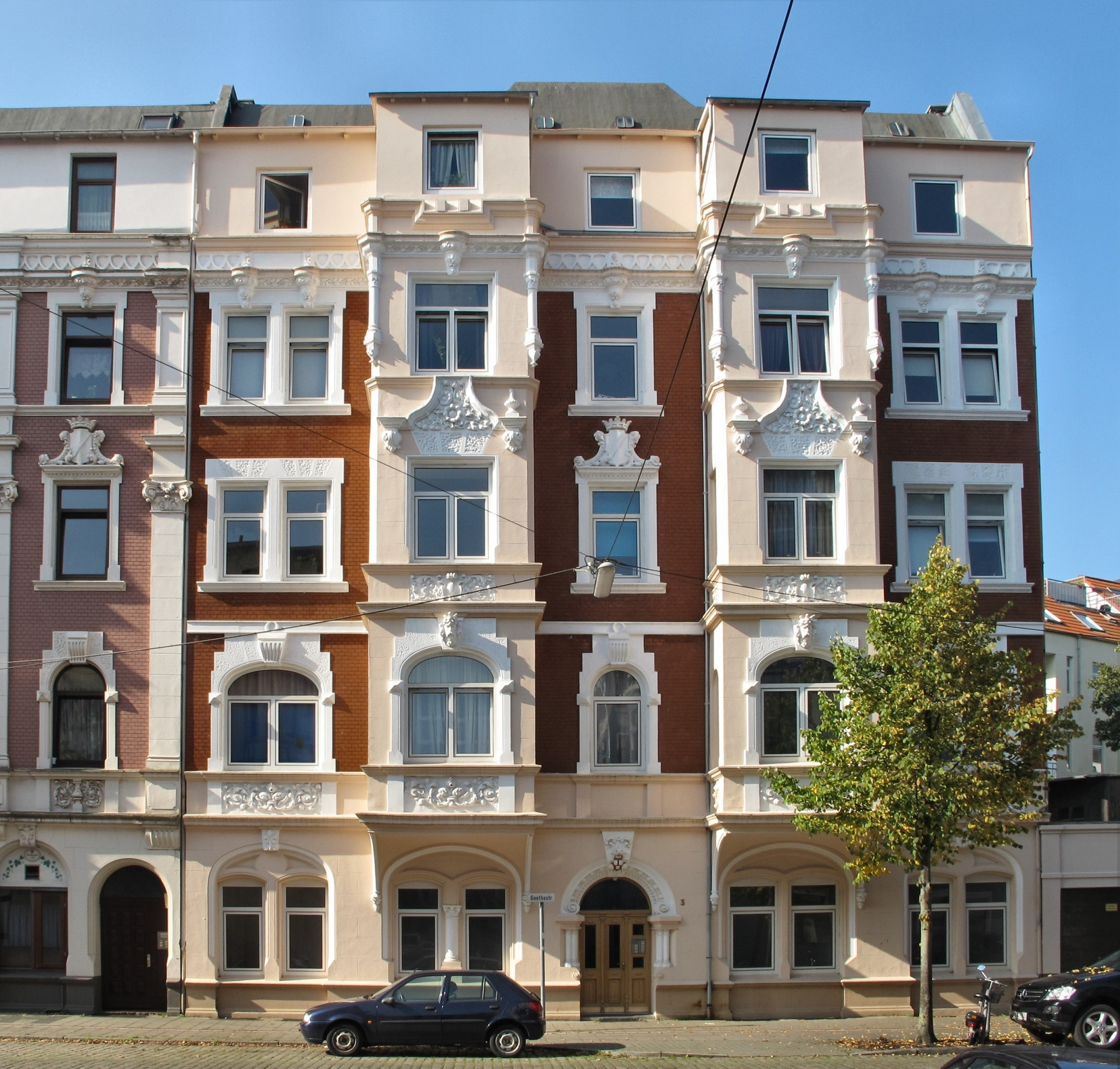 Rudelsburg in Bremerhaven, Goethestraße 3 Das abgebildete Objekt ist ein geschütztes Kulturdenkmal in der Freien Hansestadt Bremen, mit der Nr. 1693 beim Landesamt für Denkmalpflege registriert.